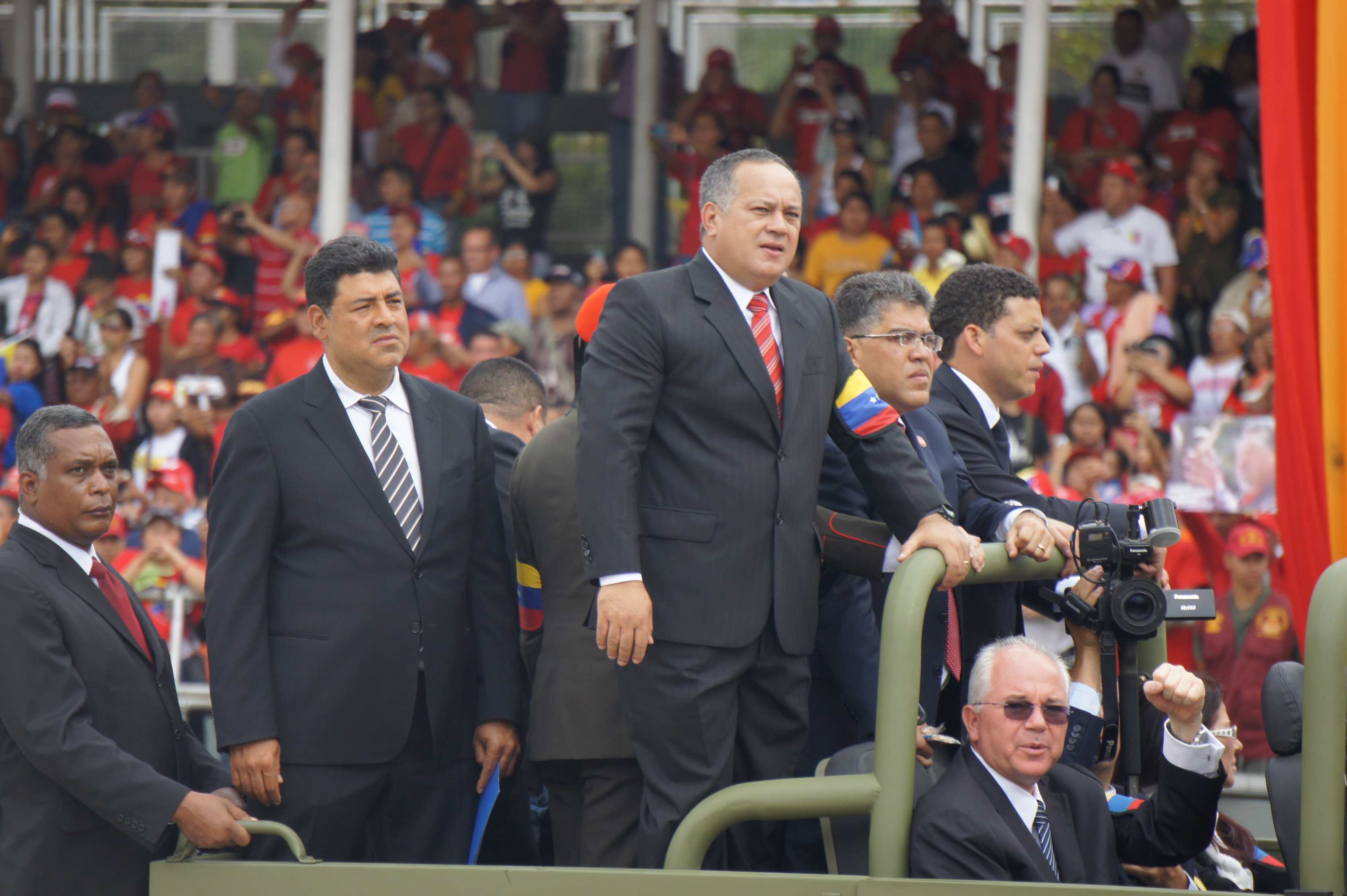 Este 15 de marzo de 2013 en el sepelio del Comandante Hugo Chávez Frías en Los Próceres, Caracas, Venezuela.